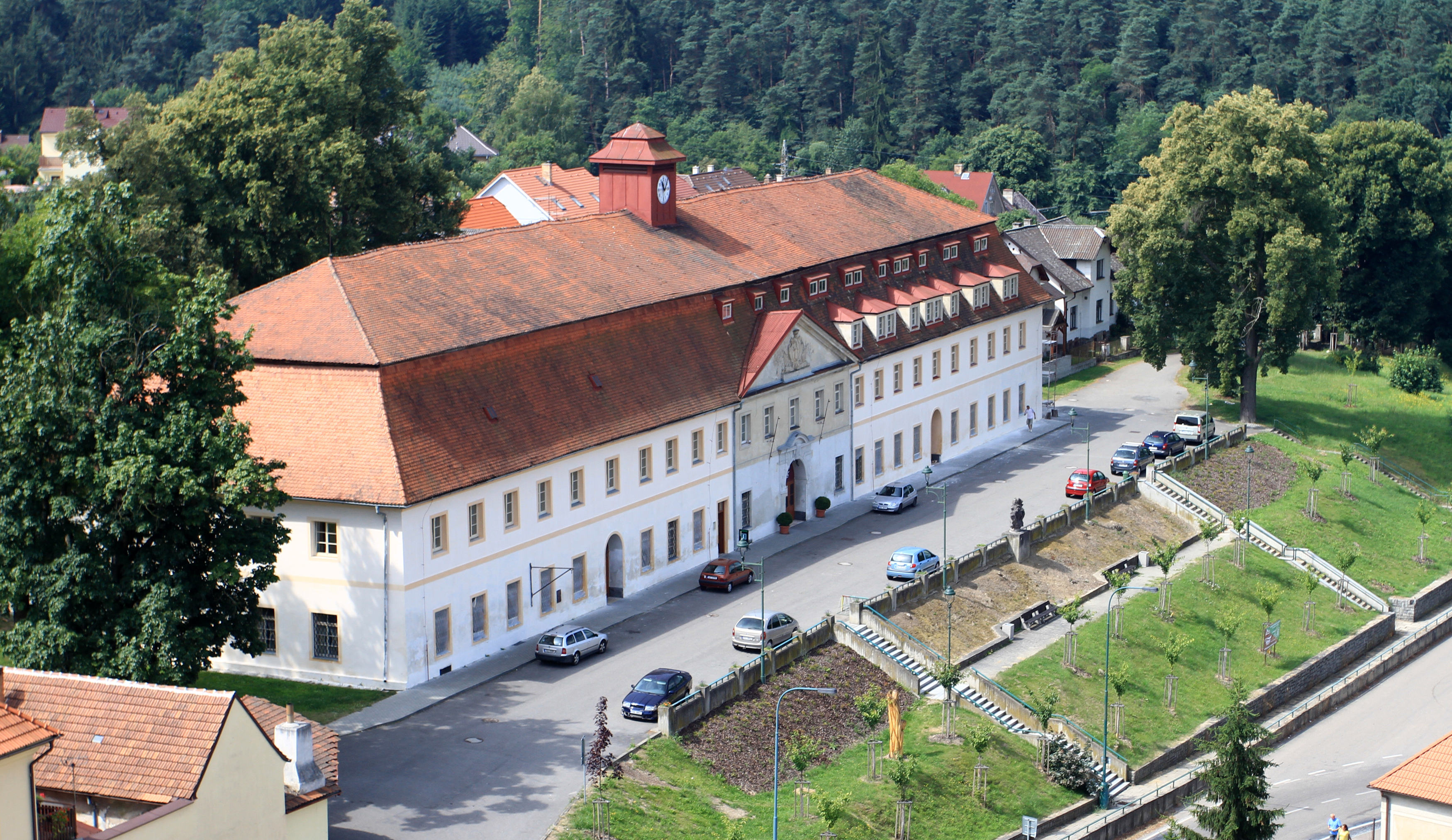 Společenský dům - bývalá továrna na kameninu (Týnec nad Sázavou), Klusáčkova 2, Týnec nad Sázavou